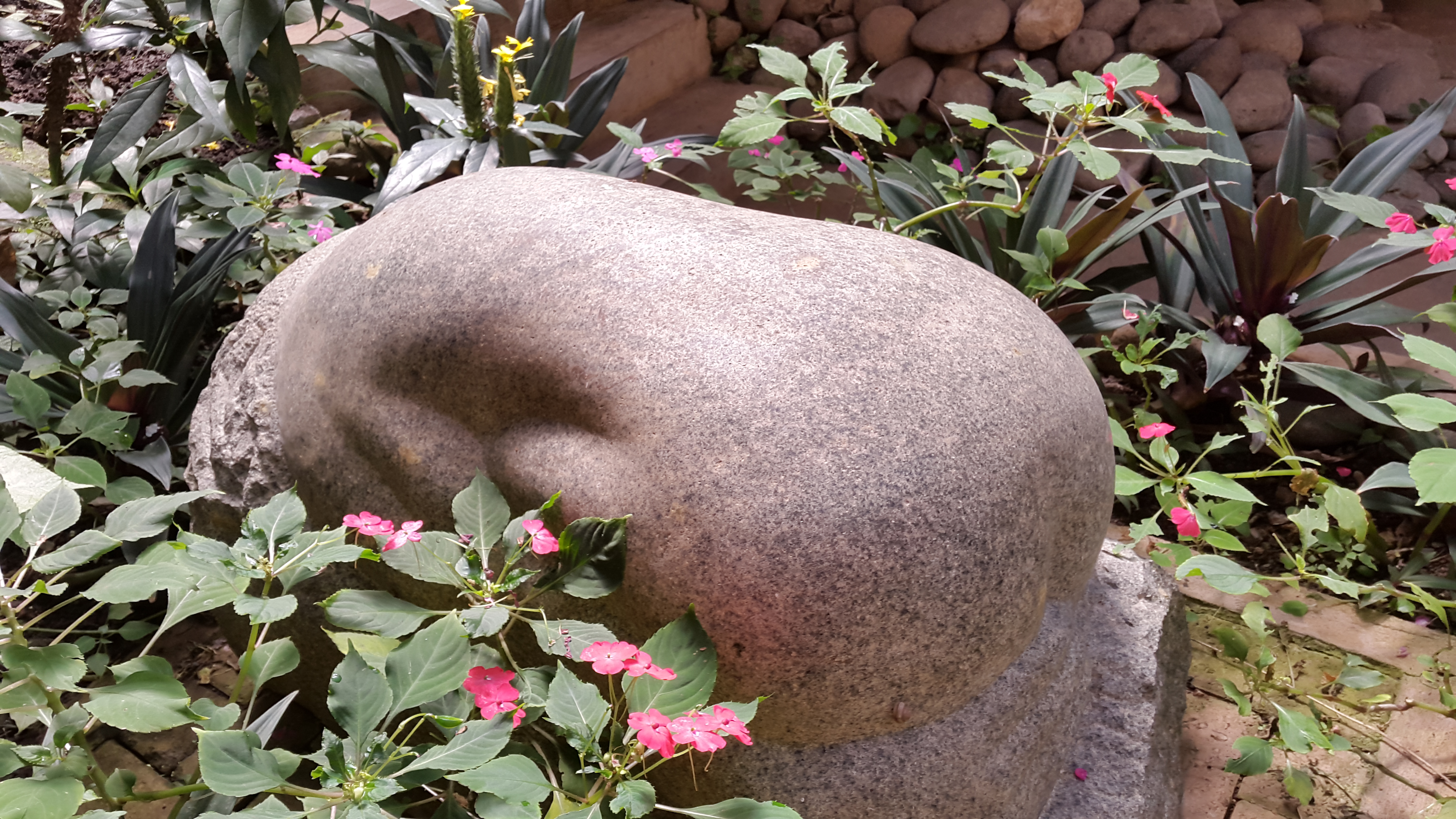 Danaide, de Max Jiménez. Museo Nacional de Costa Rica.